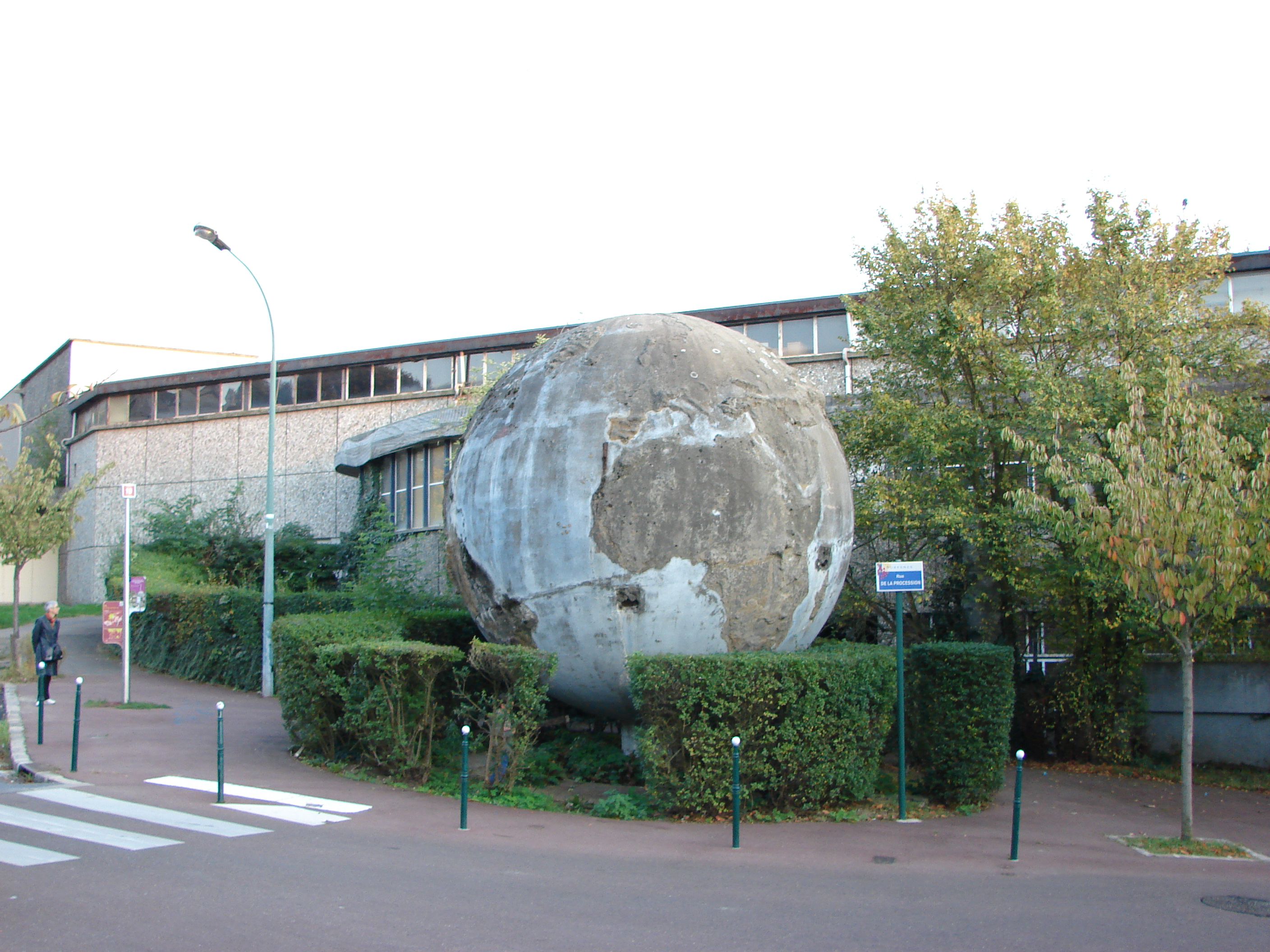 École de plein air de Suresnes